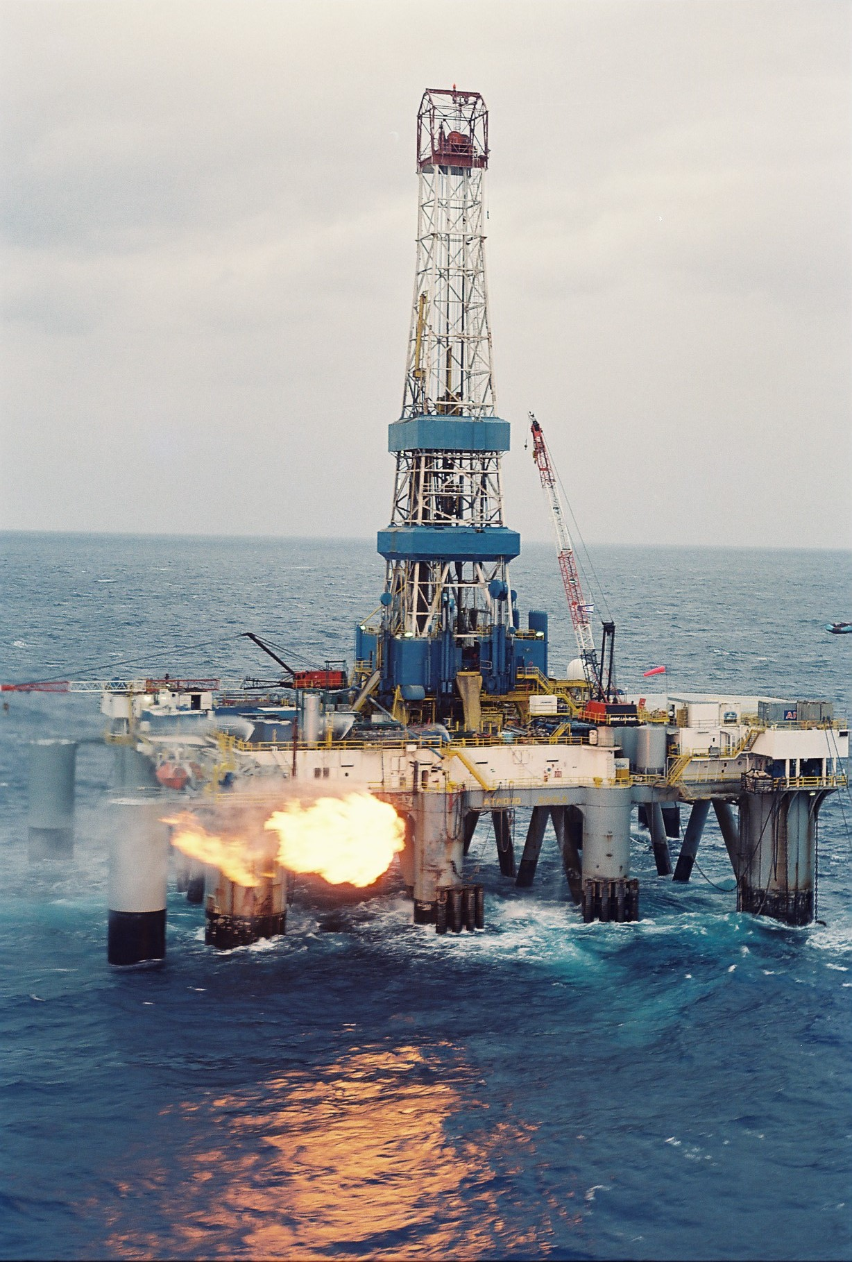 מגדל הקידוח בשדה הגז נועה בישראל